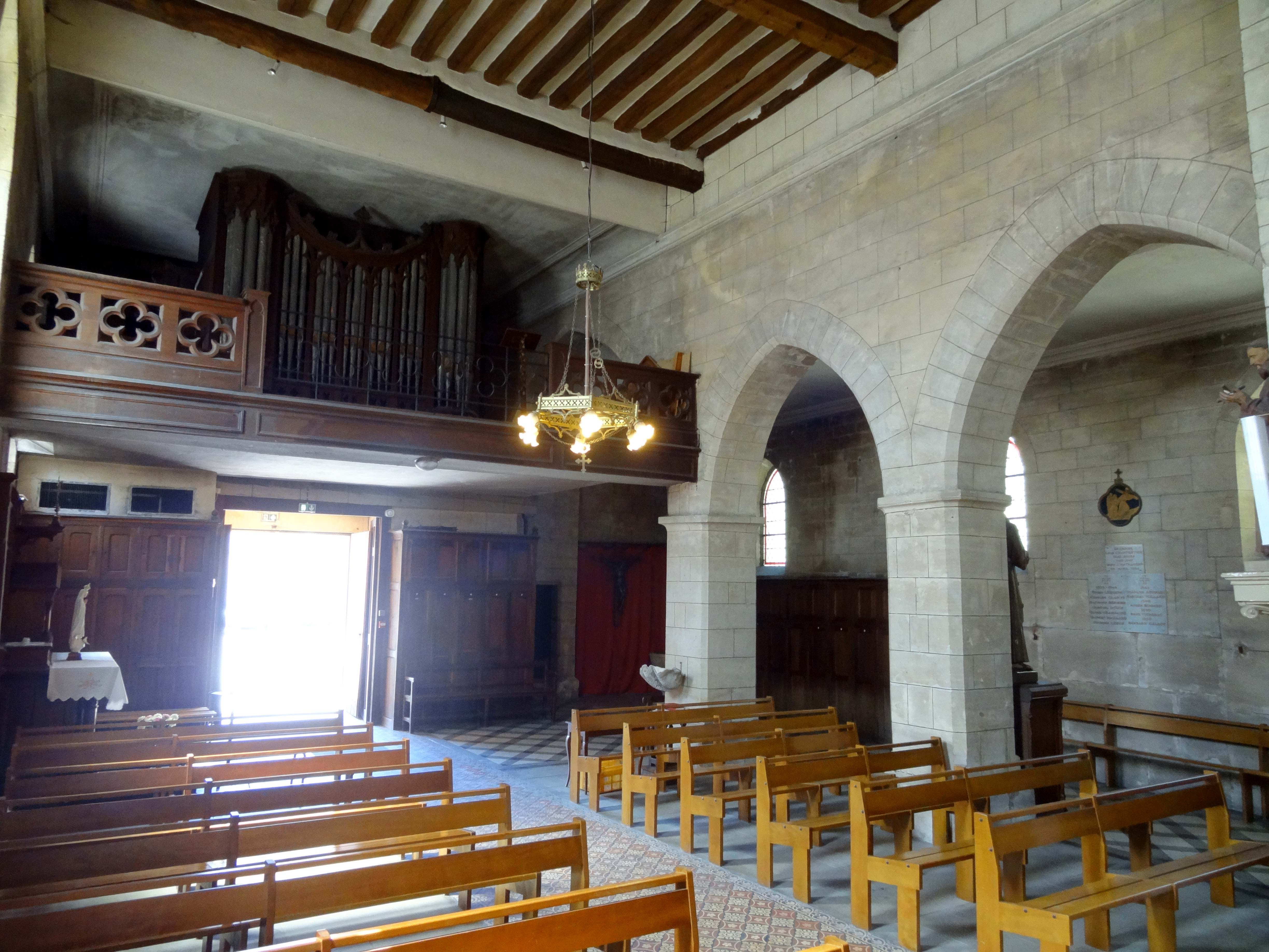 Intérieur de l'église - voir titre.